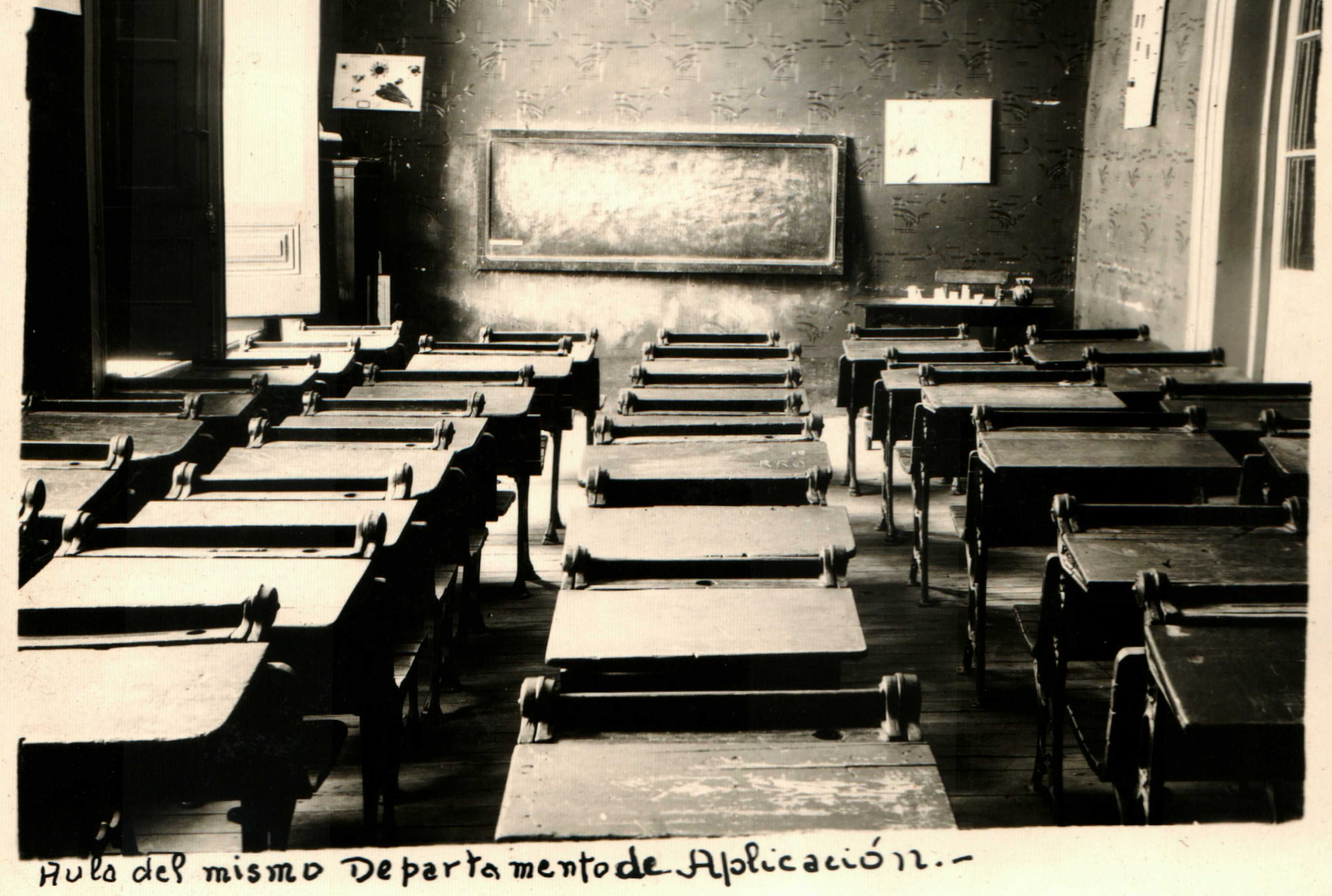 Aula Departamento de Aplicación de Catamarca. Escuela Normal Clara Jeanette Armstrong